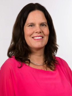 Maya Alejandra Fernández Allende en la fotografía oficial de diputados periodo 2018-2022. (Fotos: Christel Andler, René Lescornez, Johanna Zárate)